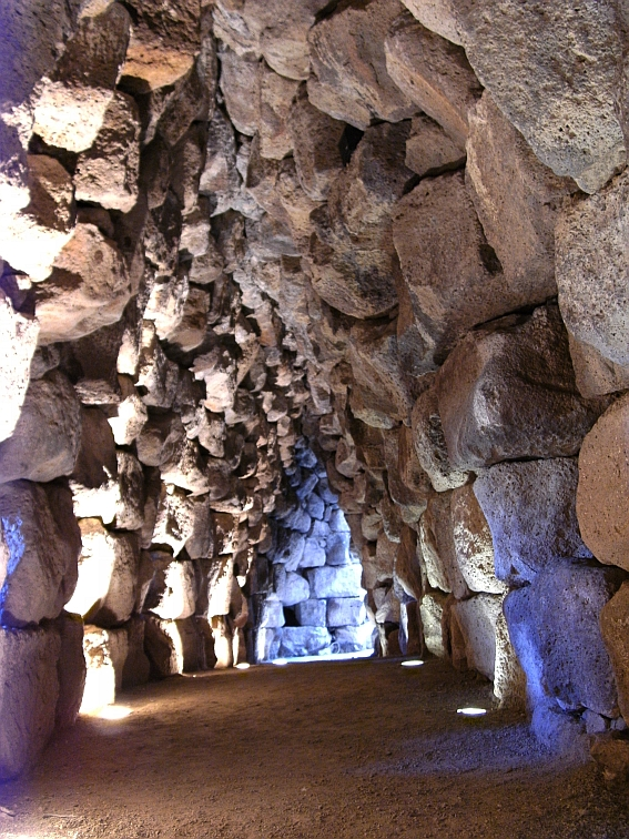 im Westgang